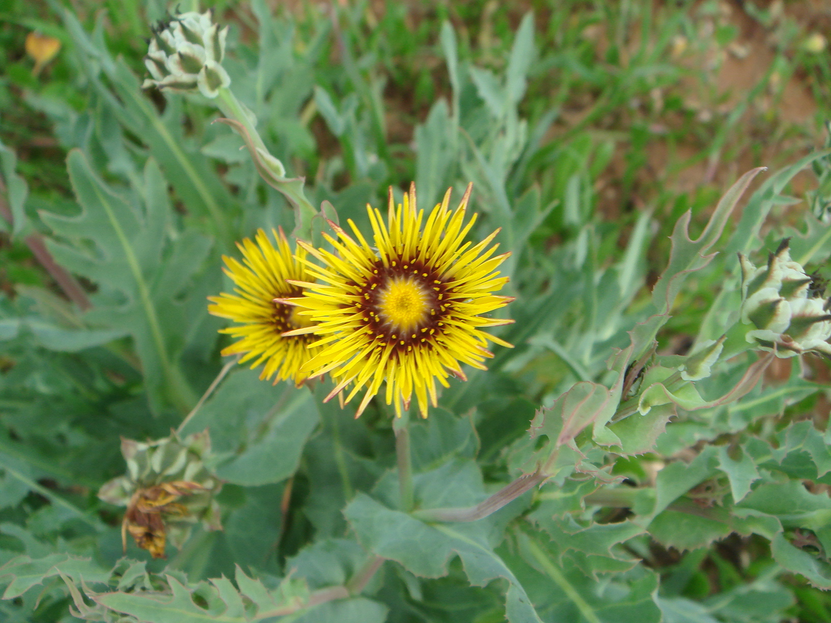 Reichardia gaditana, Pinar de La Barrosa, Chiclana (Cádiz), España